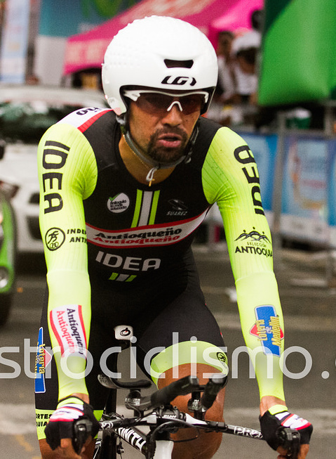 Eta8. Vuelta a Colombia 2015 - CRI Viterbo - La Virginia (23Kms). Domingo 9 de agosto de 2015